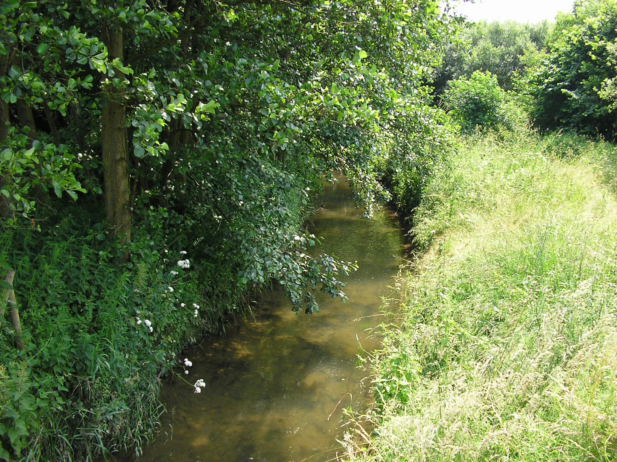 Lübbecker Anteil an der Großen Aue